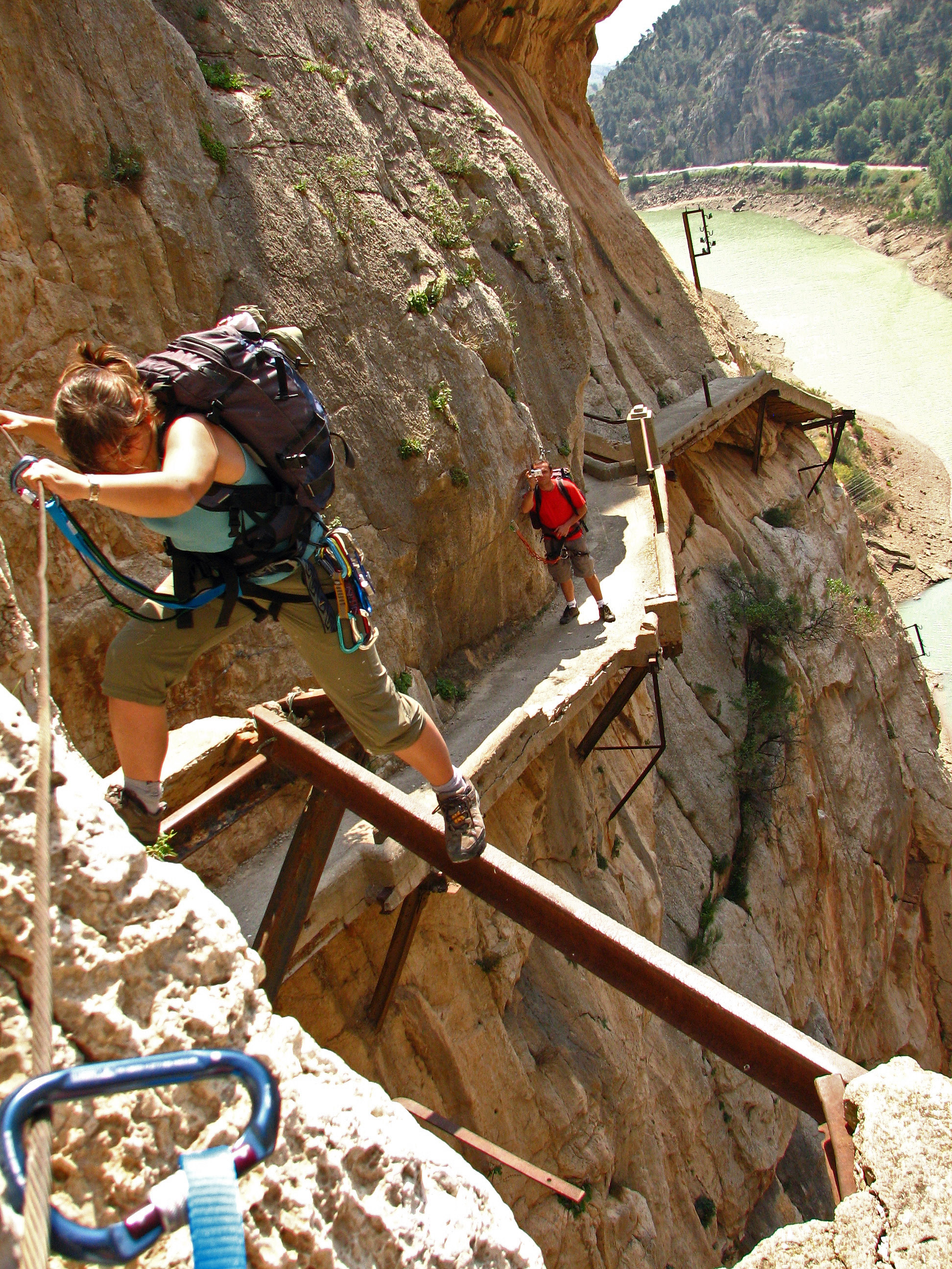 Caminito del Rey in El Chorro (Málaga, Spain)